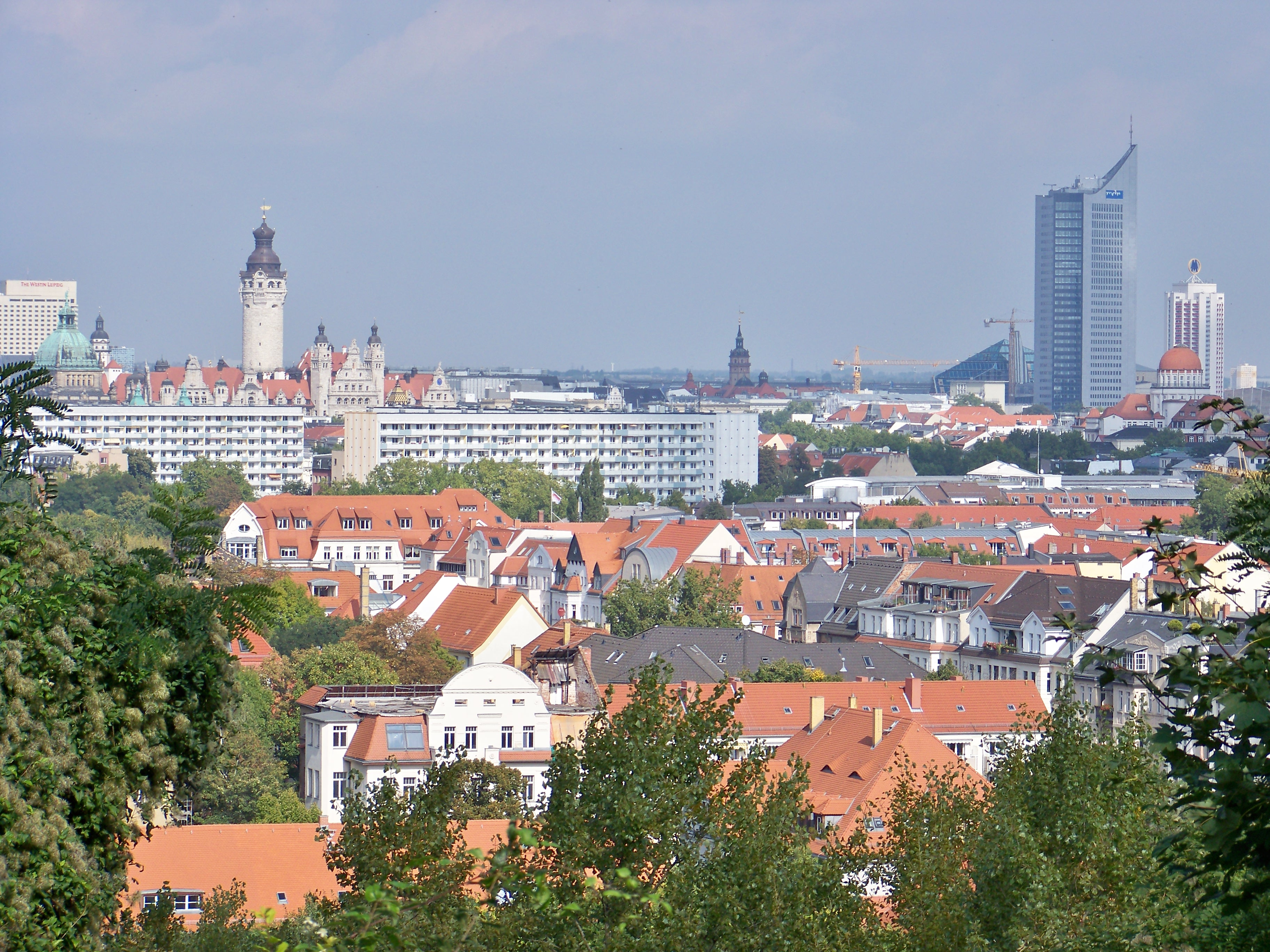 Blick vom Fockeberg über das Leipziger Stadtzentrum mit Blickrichtung Nordnordost; v. l. n. r. Westin-Hotel, Bundesverwaltungsgericht, Turm des Neuen Rathauses, Nikolaikirchturm, Uni-Hochhaus, LVB-Zentrale (das Gebäude mit Kuppel), Wintergartenhochhaus; im Vordergrund Wohnbebauung in der Südvorstadt